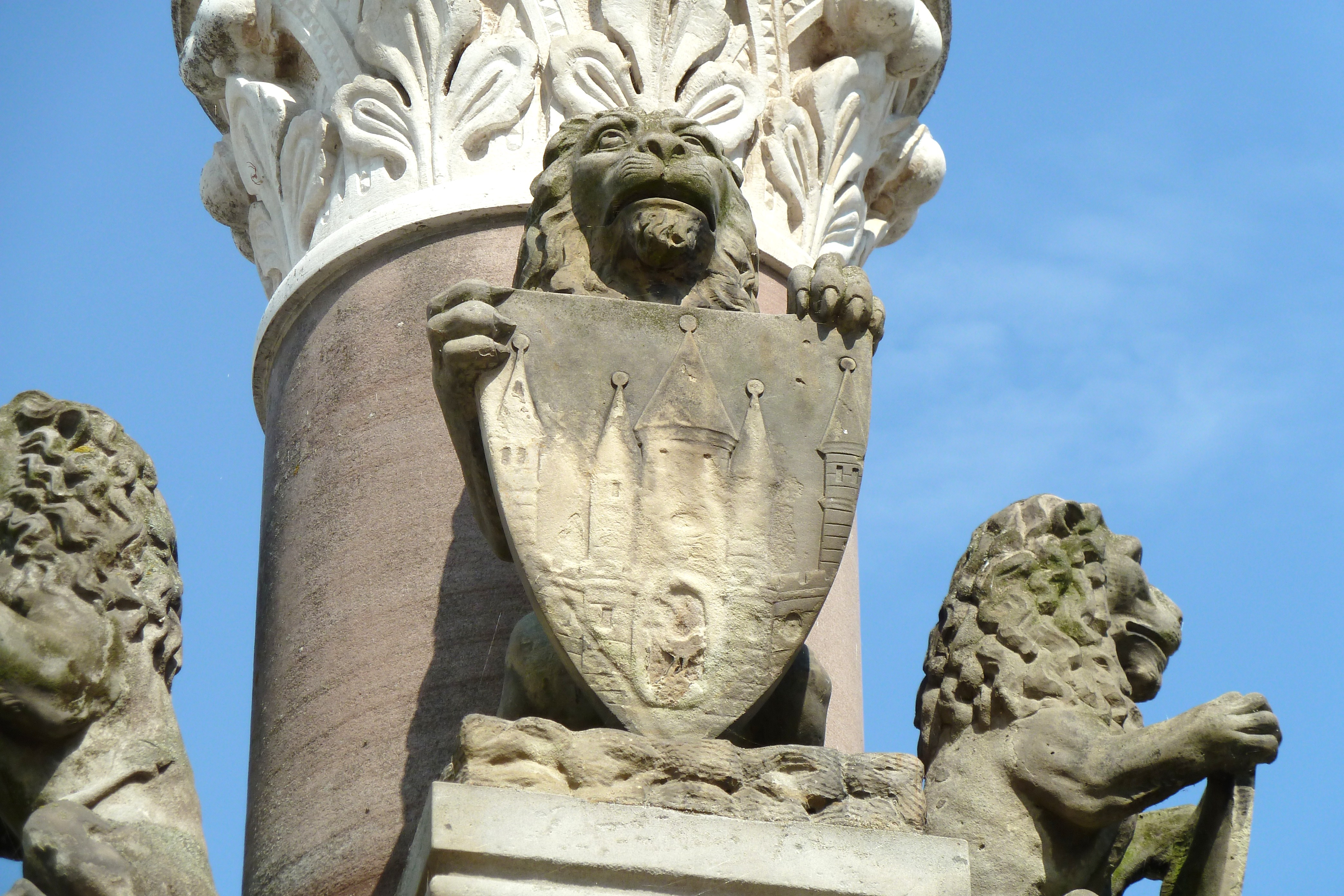 Heinrichsbrunnen auf dem Markt in Meiningen, Detail: sitzender Löwe mit dem Meininger Stadtwappen